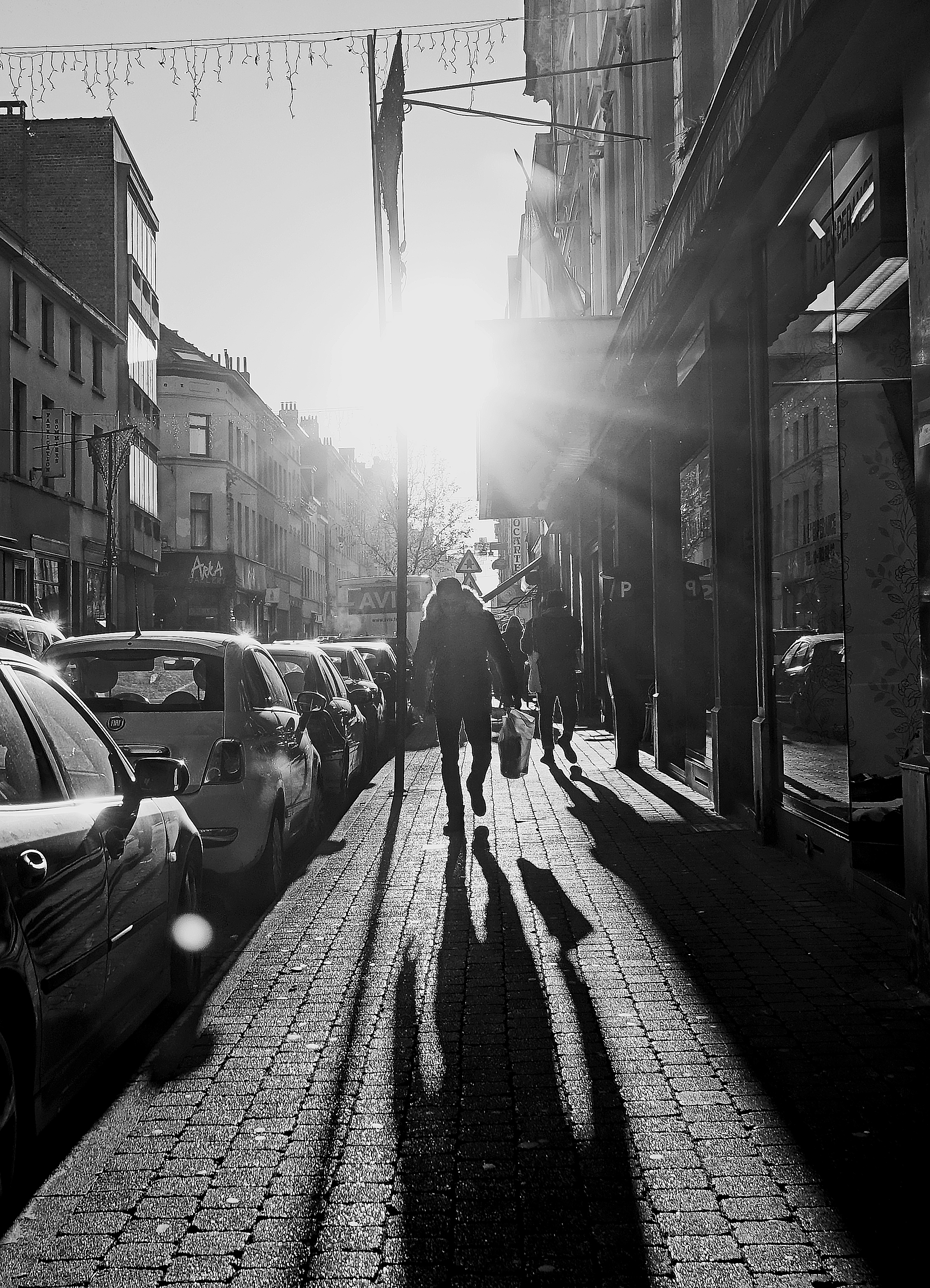 Contre jour Rue Blaes quartier de Maroles This photo of immovable heritage has been taken in the Brussels Capital Region